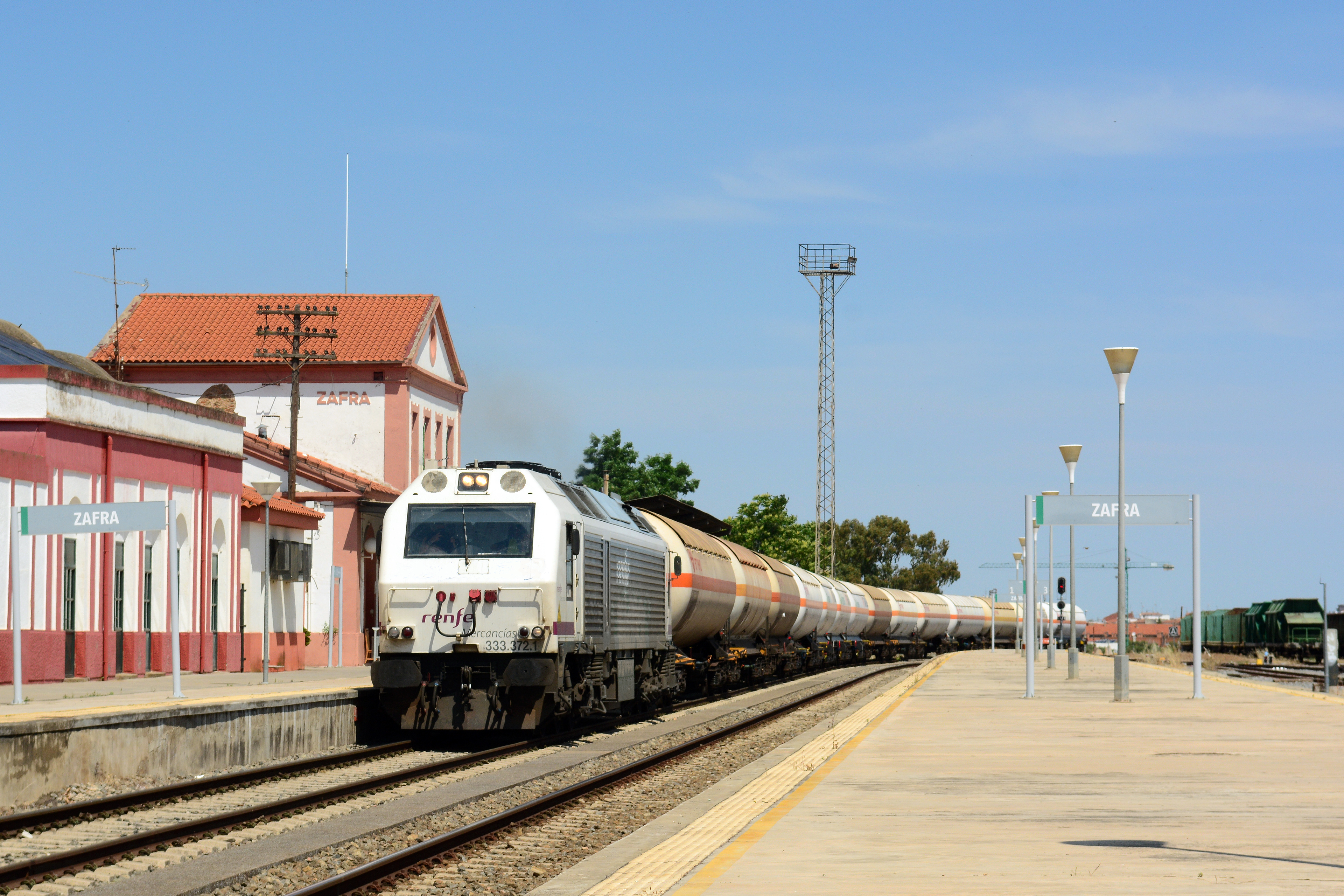 Comboio 83348 de amoníaco desde Badajoz a Huelva chegando a estação de Zafra.